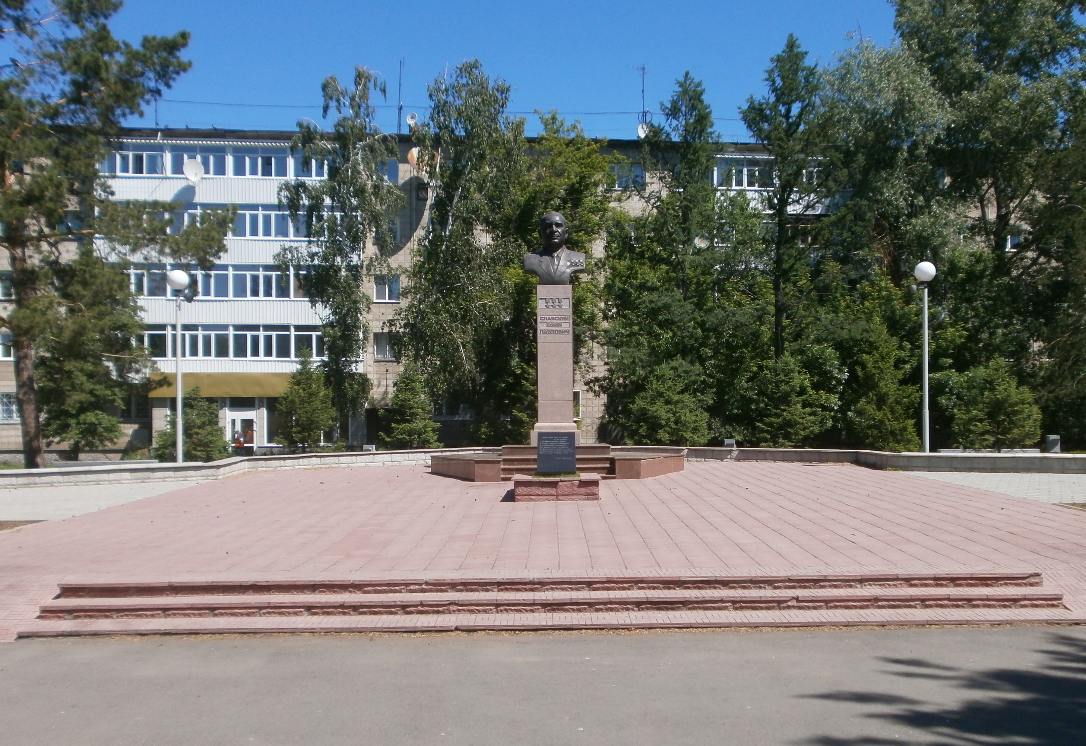 Памятник Ефиму Павловичу Славскому в Усть-Каменогорске